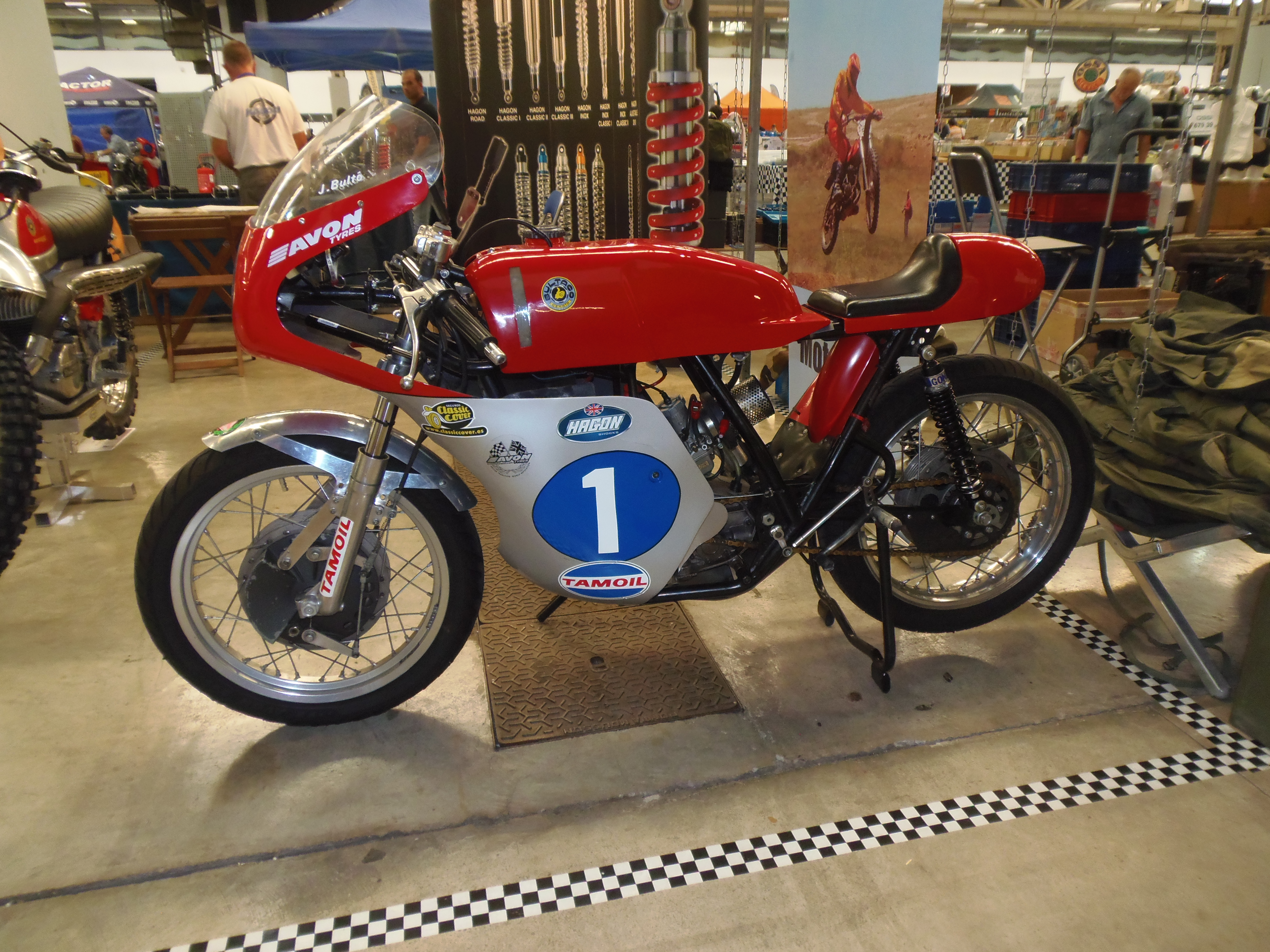 Bultaco TSS 350, 1969